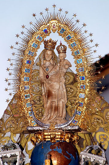 Ntras Señora de los Milagros, patrona de Palos de la Frontera